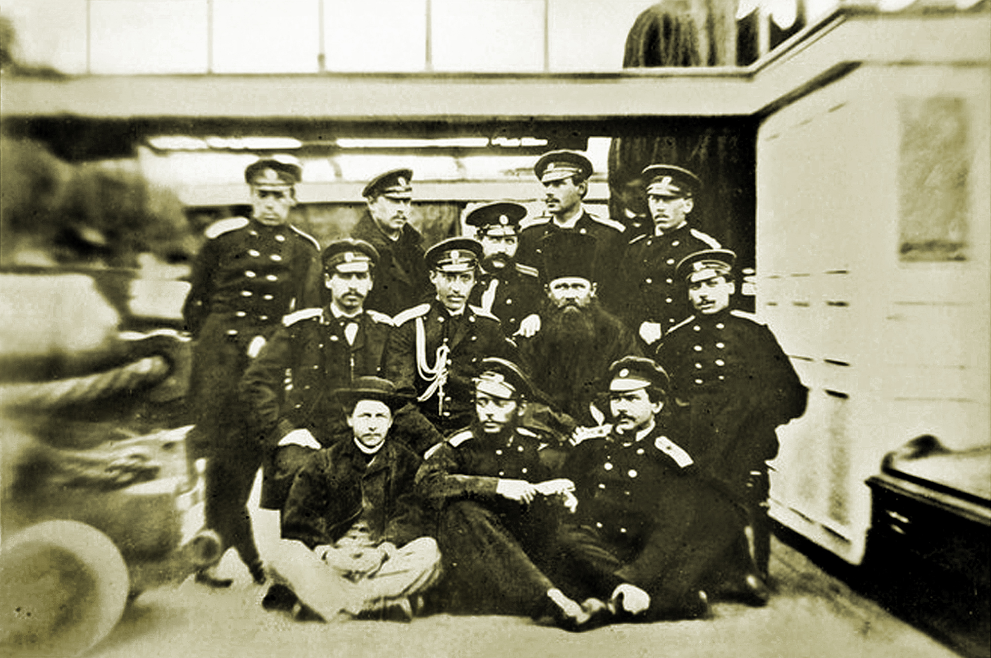 Офицеры корвета "Варяг". Снимок сделан в САСШ в 1863-1864 годах